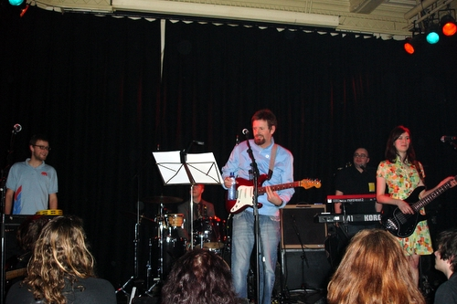 Scritti Politti